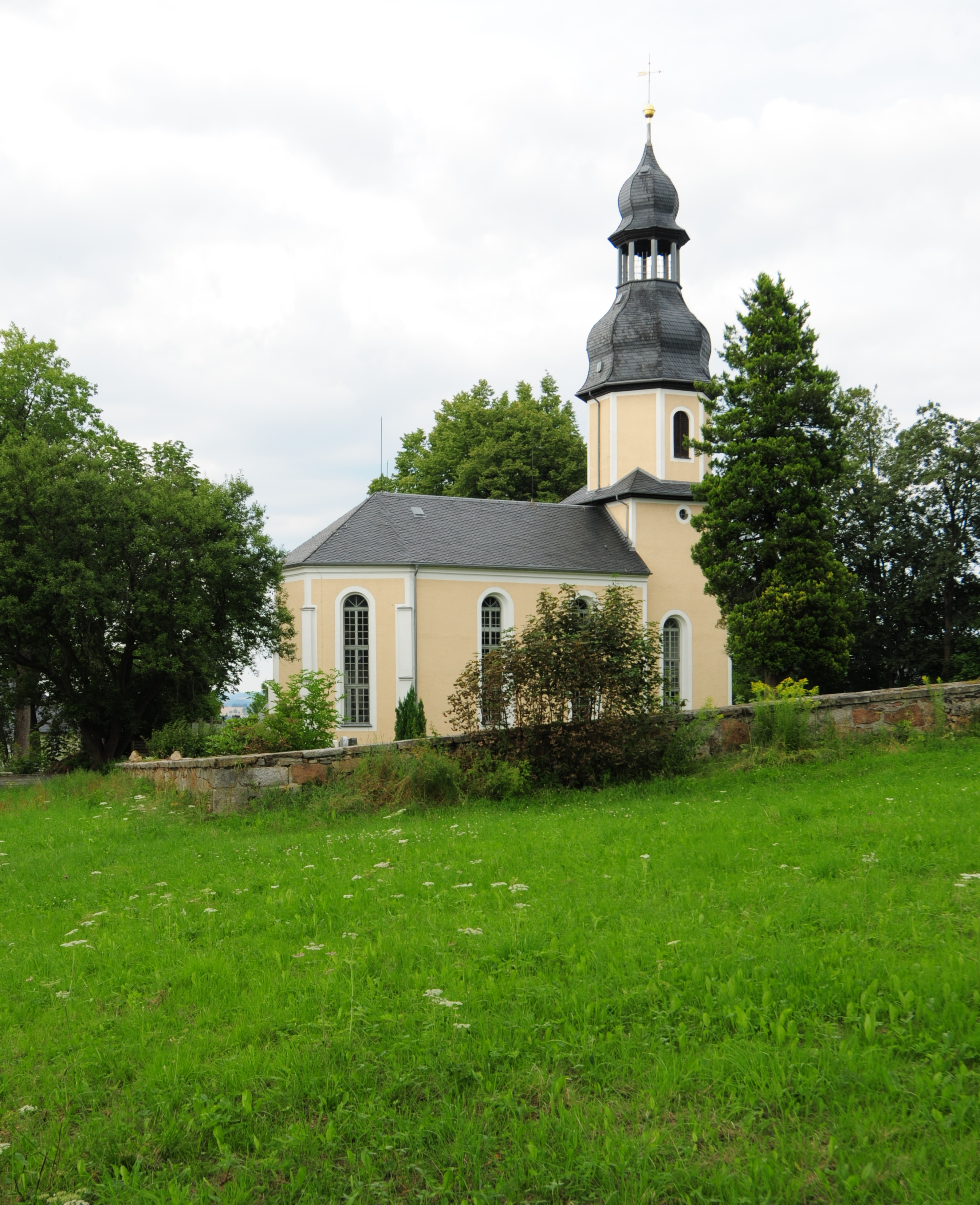 Landwüst (Gemeinde Markneukirchen), evangelische Laurentiuskirche (Vogtlandkreis, Sachsen, Deutschland)